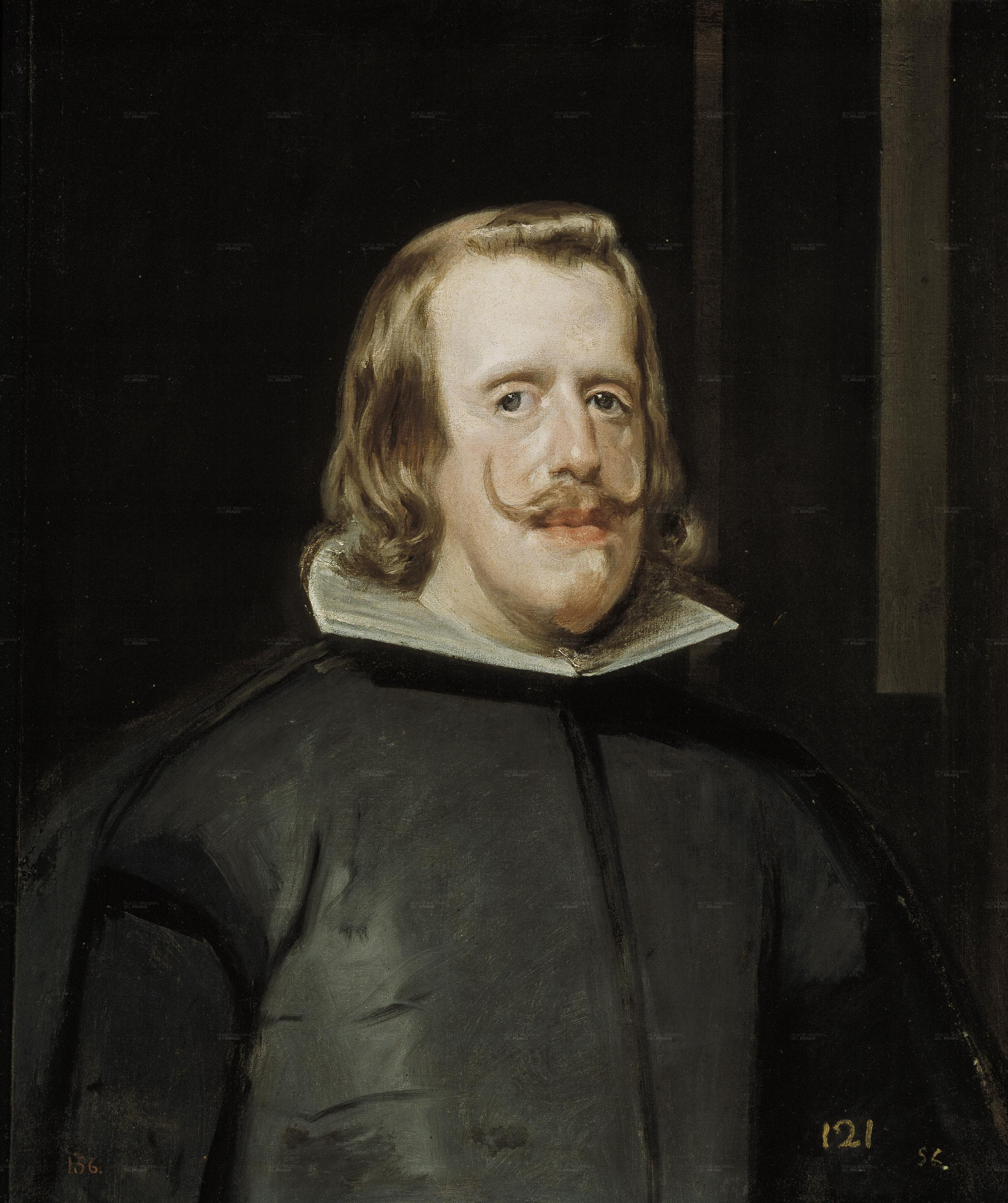 Retrato del rey Felipe IV de España (1601-1665), que fue hijo del rey Felipe III de España y de la reina Margarita de Austria.